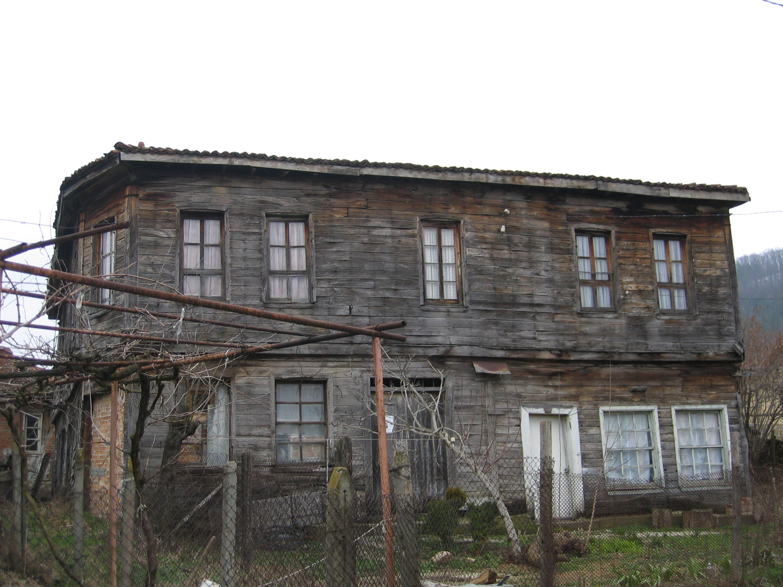 Къща в село Кости;© 2006 Зорница Йорданова Гръцките къщи в село Кости пазят в себе си загадъчни истории за скрити иманета..., но и за трагедията на бежанците от двете страни на граница�